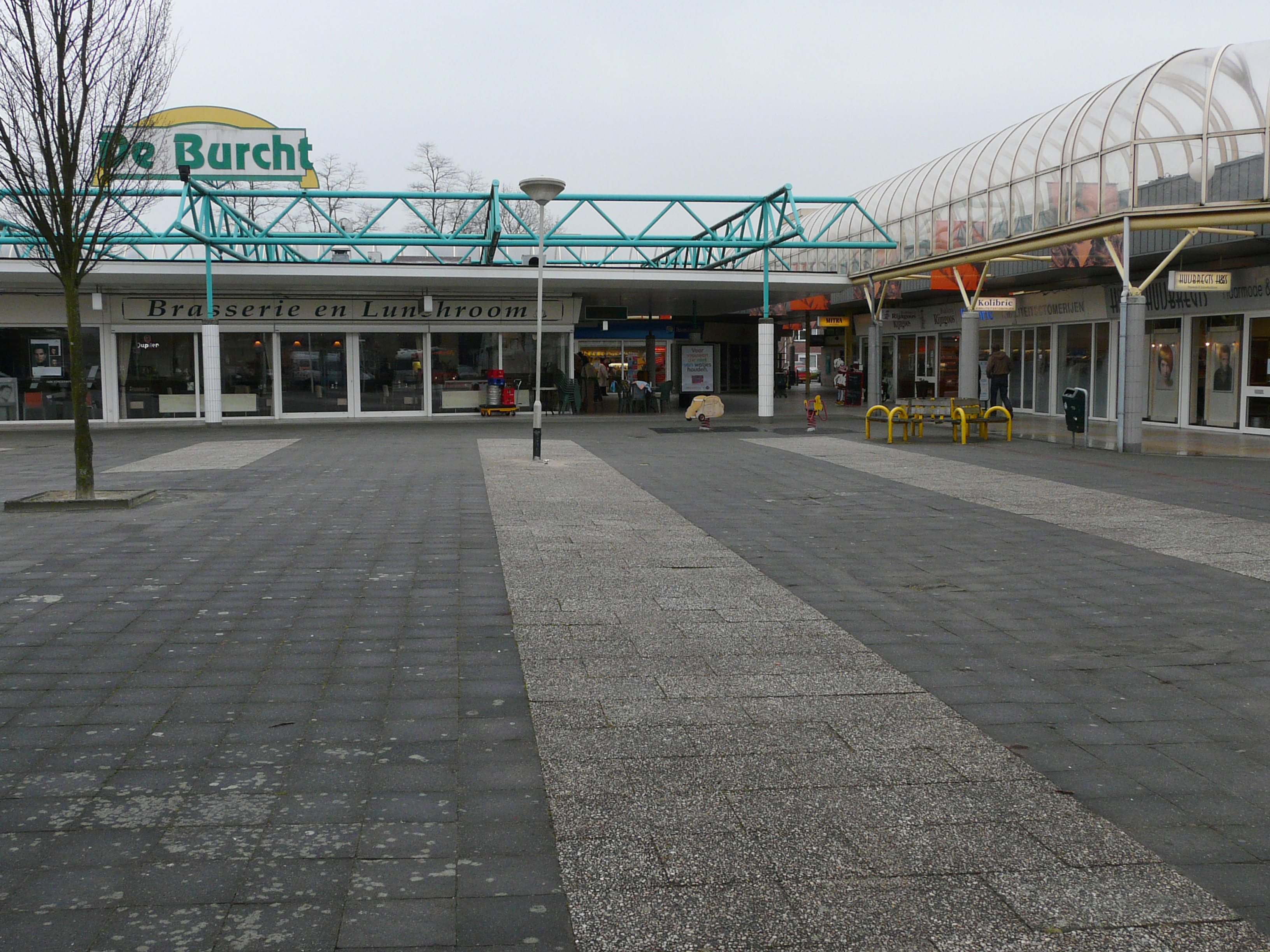 Winkelcentrum de Burcht in de wijk IJpelaar in Breda Zuid